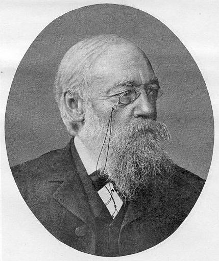 Wilhelm Dittenberger (1840–1906), deutscher Altphilologe. Originalphotographie von F. Möller, Halle (aus dem Beistz von Prof. Carl Robert)